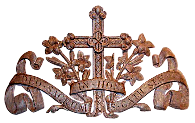 Dédicace à Sainte Catherine de Sienne, La Royante, Aubagne en Provence, France